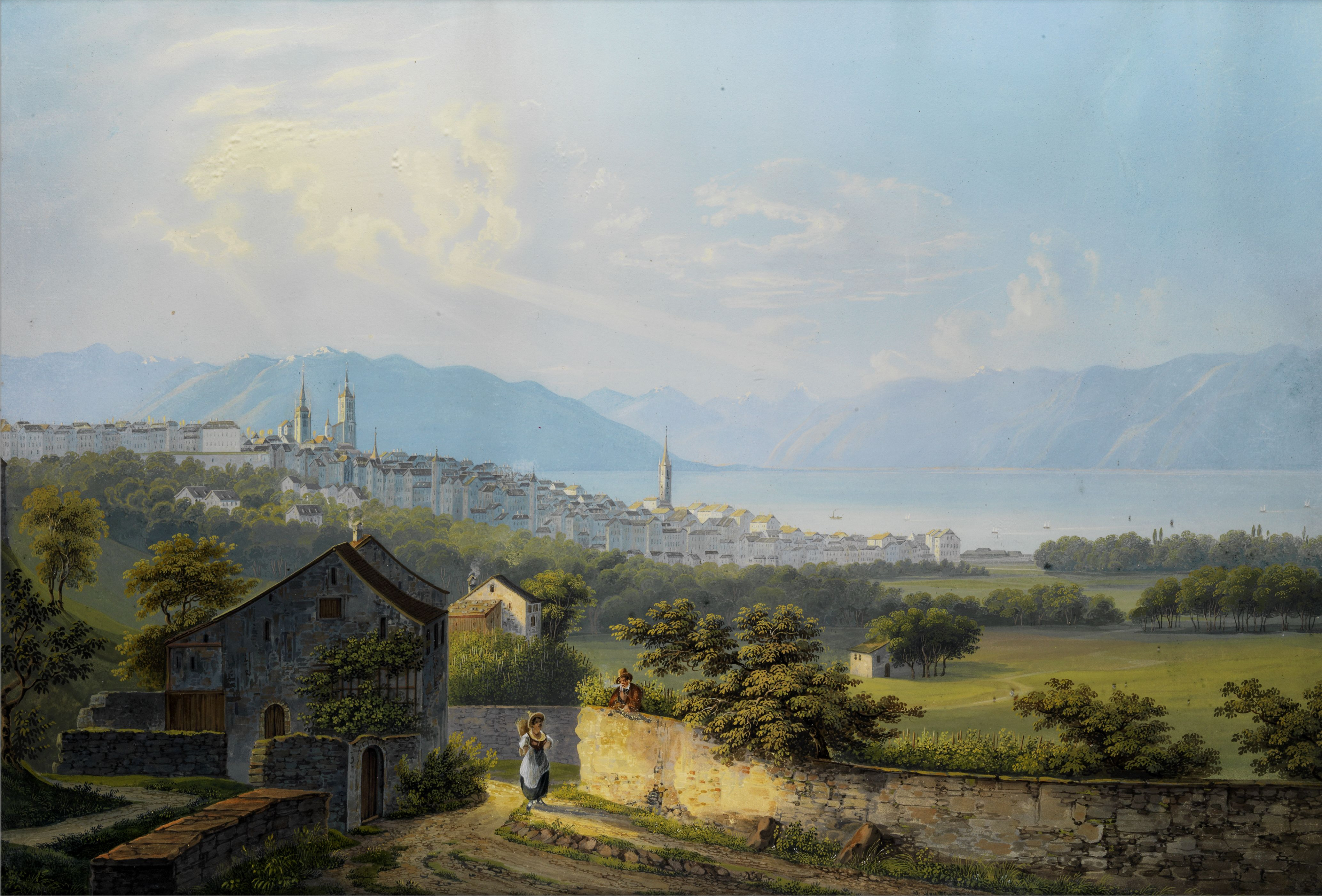 Blick über Lausanne. Gouache auf Papier. 47 x 67 cm. Anfang 19. Jahrhundert.